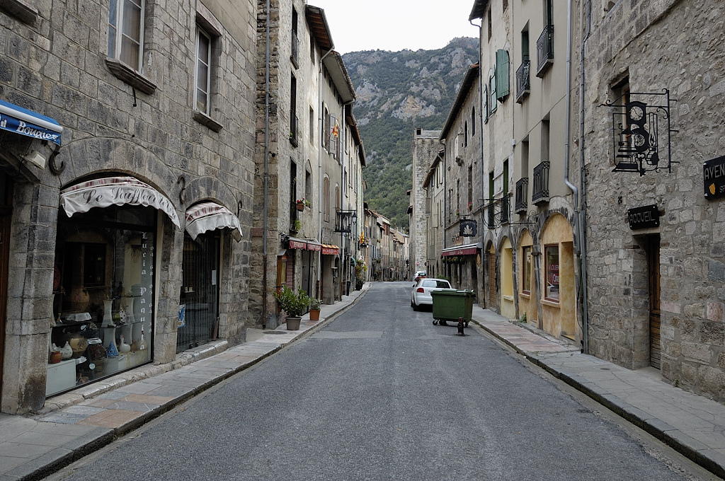 Rue Saint-Jean